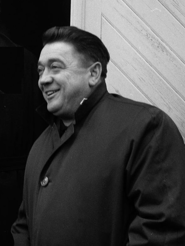 15 janvier 1967. plan 3/4 de Puig Aubert (vue de face)